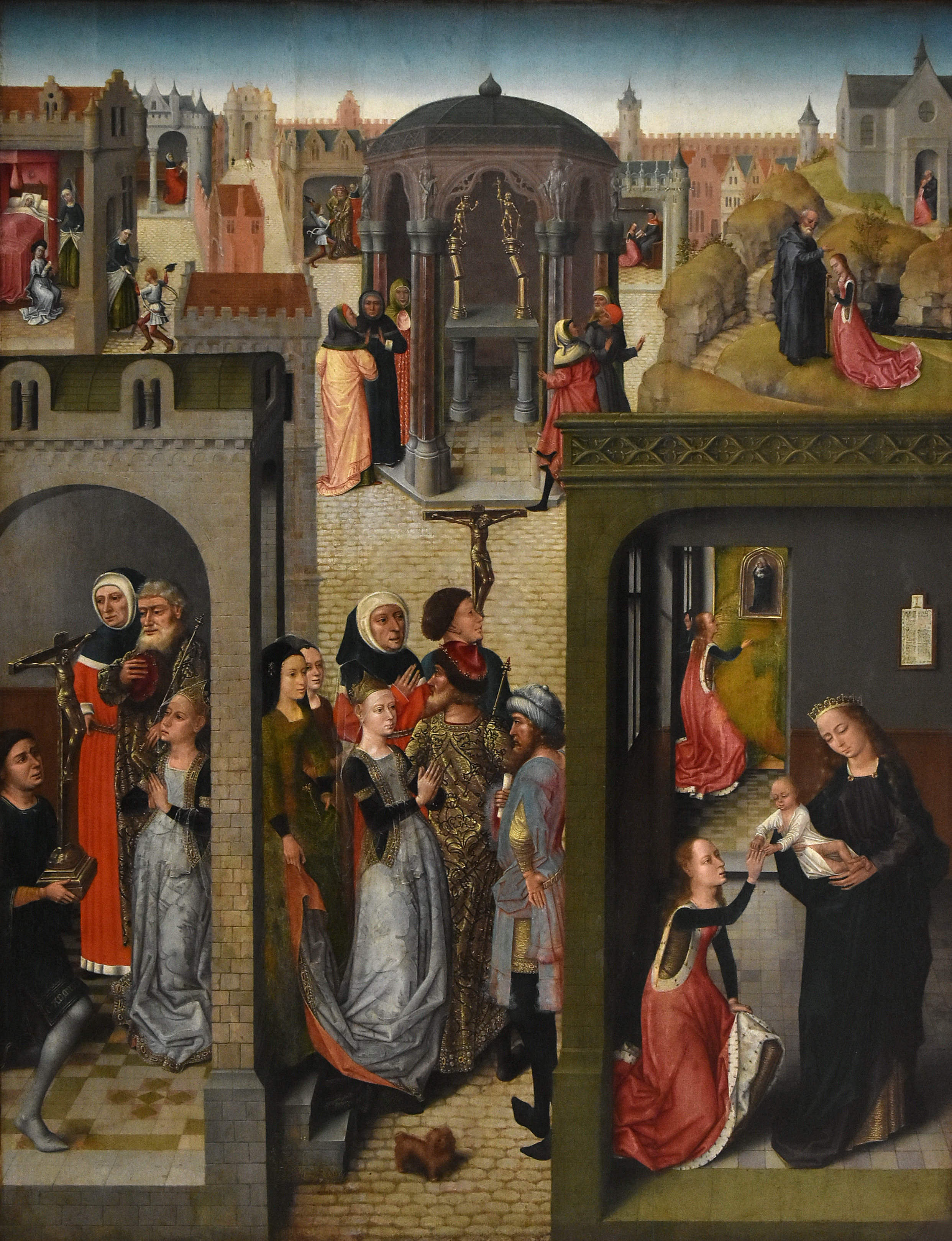 Meester van de Catharinalegende (ca.1470-1500) Episoden uit het leven van de H. Catharina KMSKB 29-01-2019